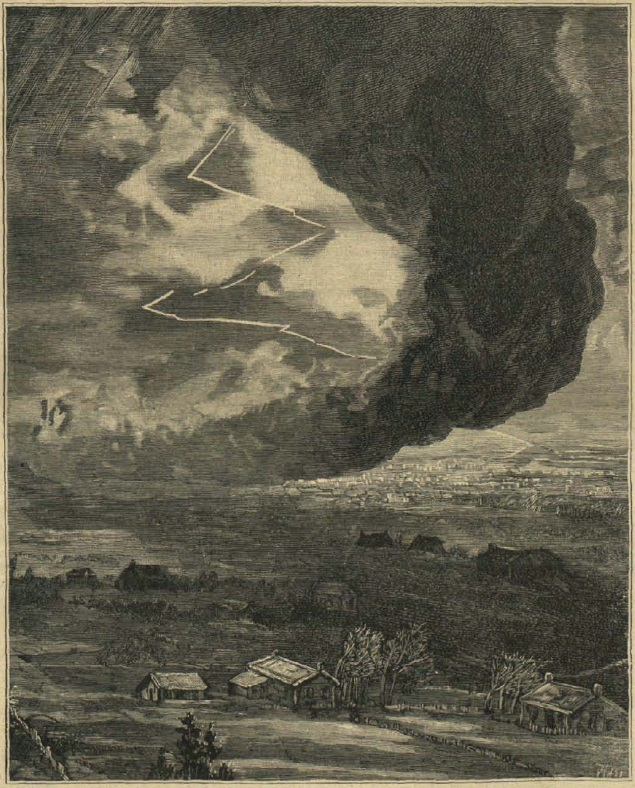 "Formación y marcha de un ciclón"